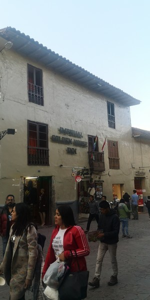 Frontis de la antigua casa de Martín Chambi en la calle Marqués, Cusco, Perú.